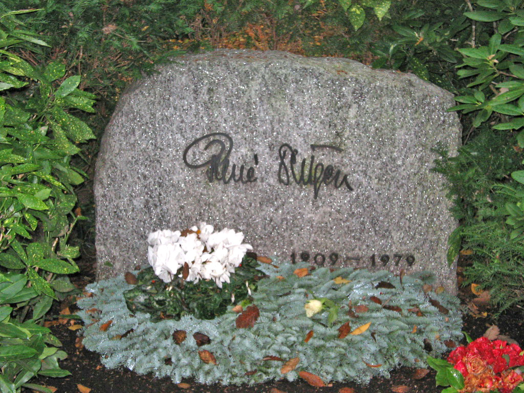 René Deltgen Grafsteen